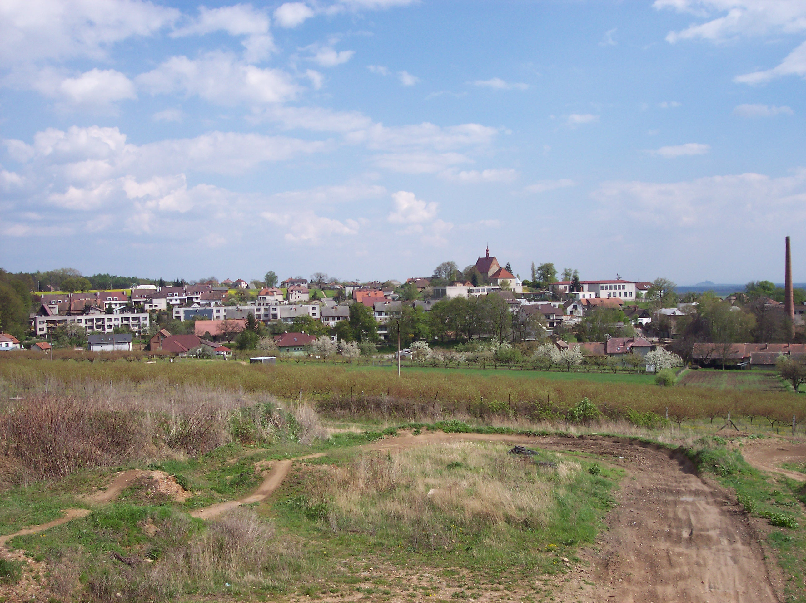 Moje fotka